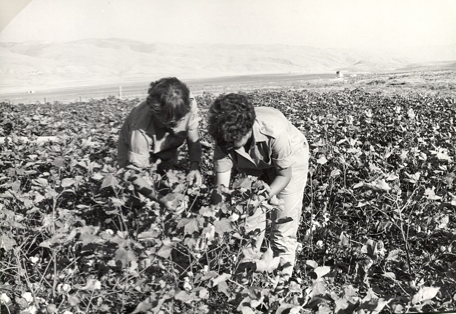 צולם ע"י צלמ/ת "במחנה" באדיבות ארכיון המועצה האזורית בקעת הירדן